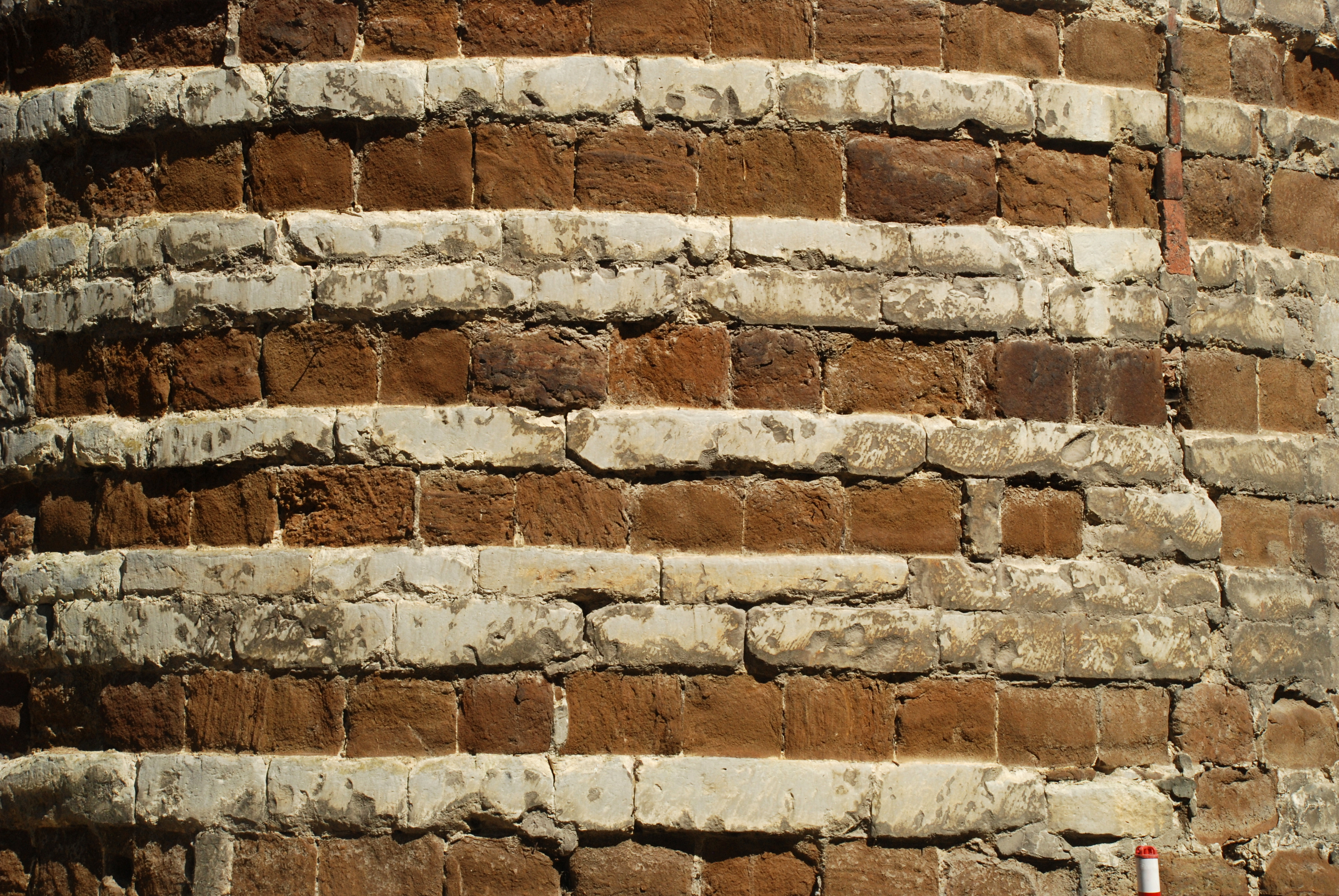 Belgique - Brabant flamand - Louvain - Première enceinte de Louvain - terrain des hôpitaux universitaires Saint-Pierre et Saint-Raphaël